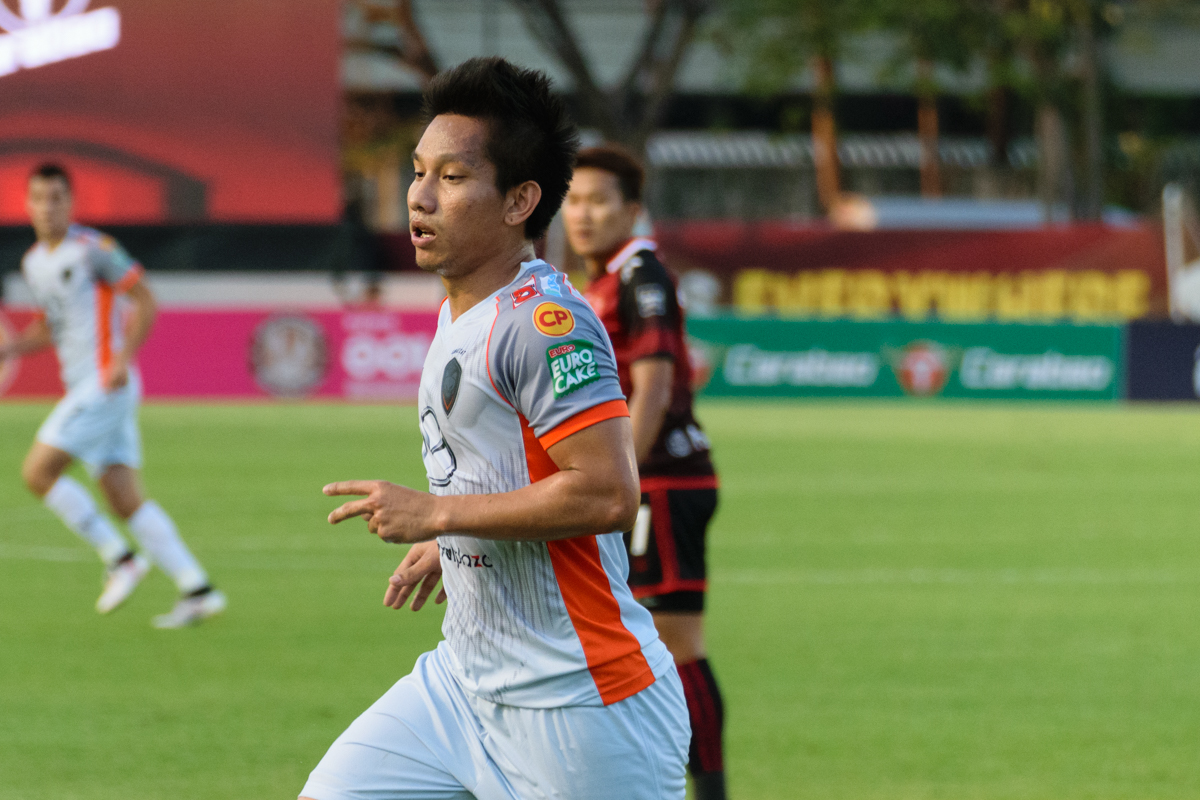 Attapong Nooprom